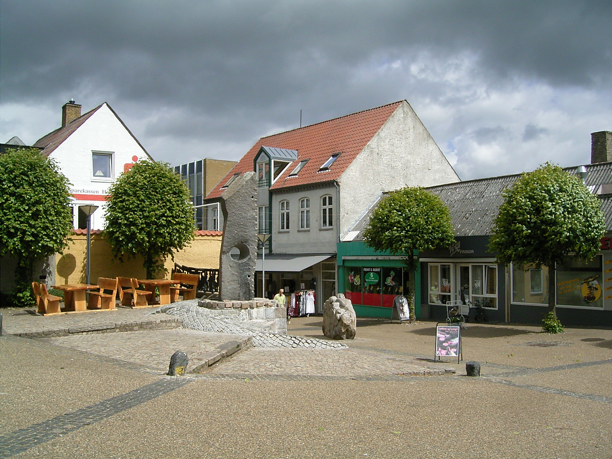 Adelgade in Hobro